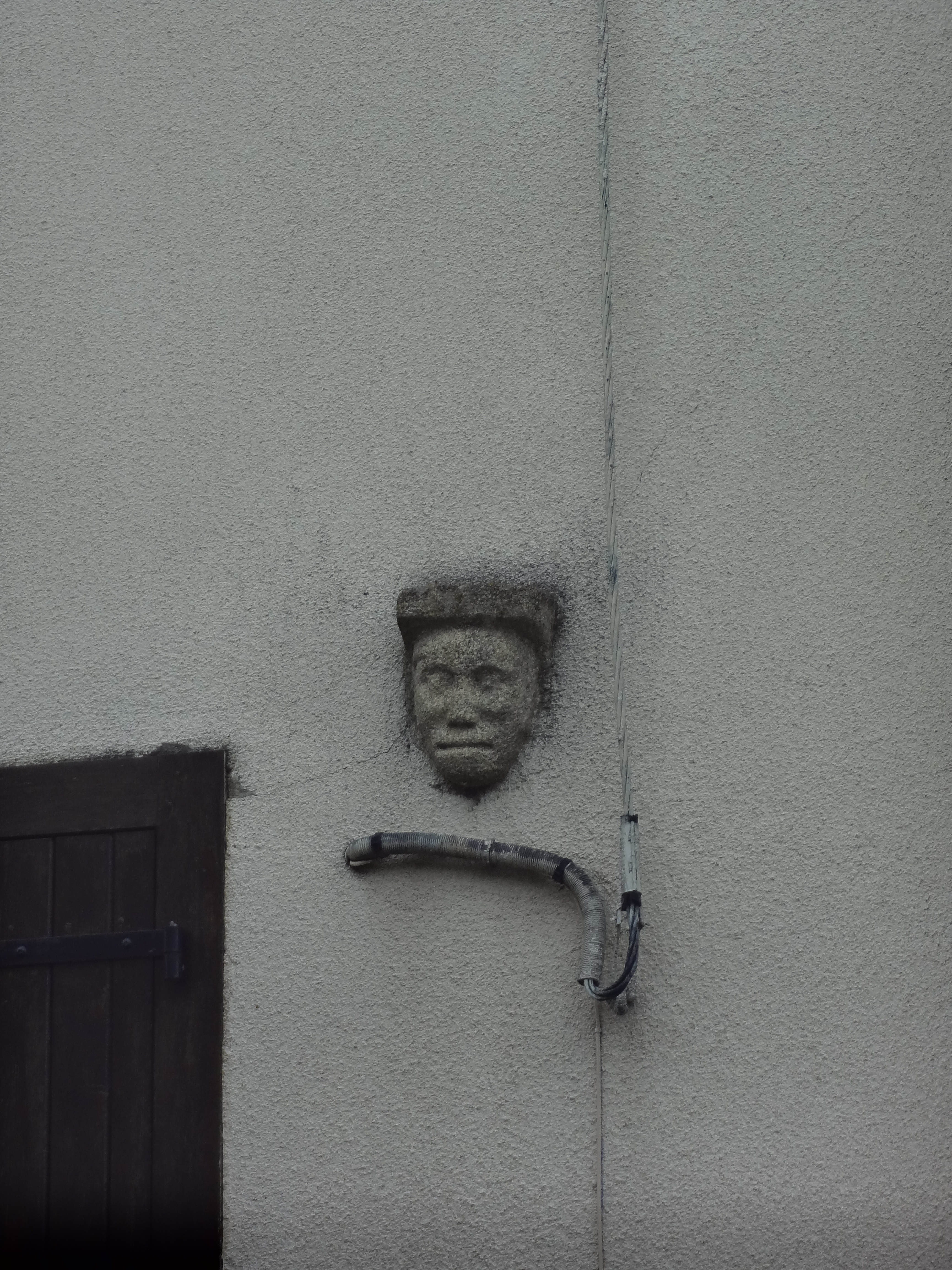 tête sculptée sur la façade d'une maison proche de l'église